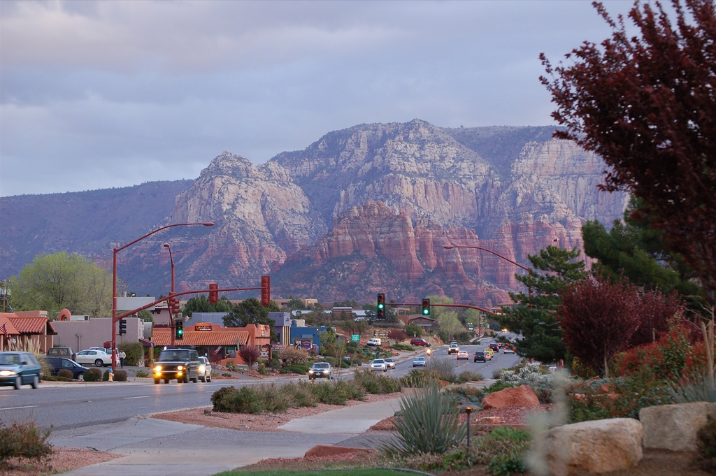 Sedona, Arizona